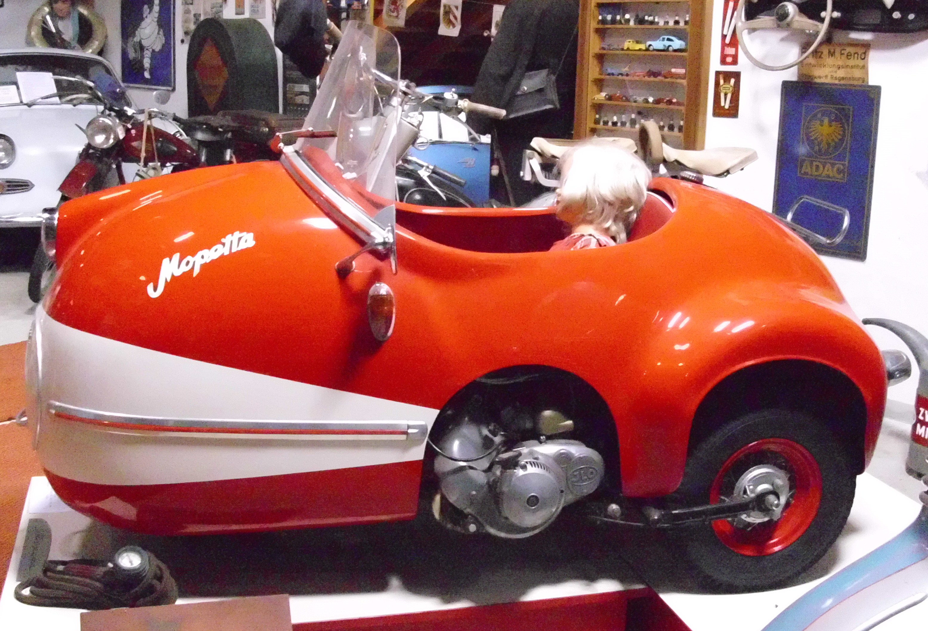 Brütsch Mopetta 1957